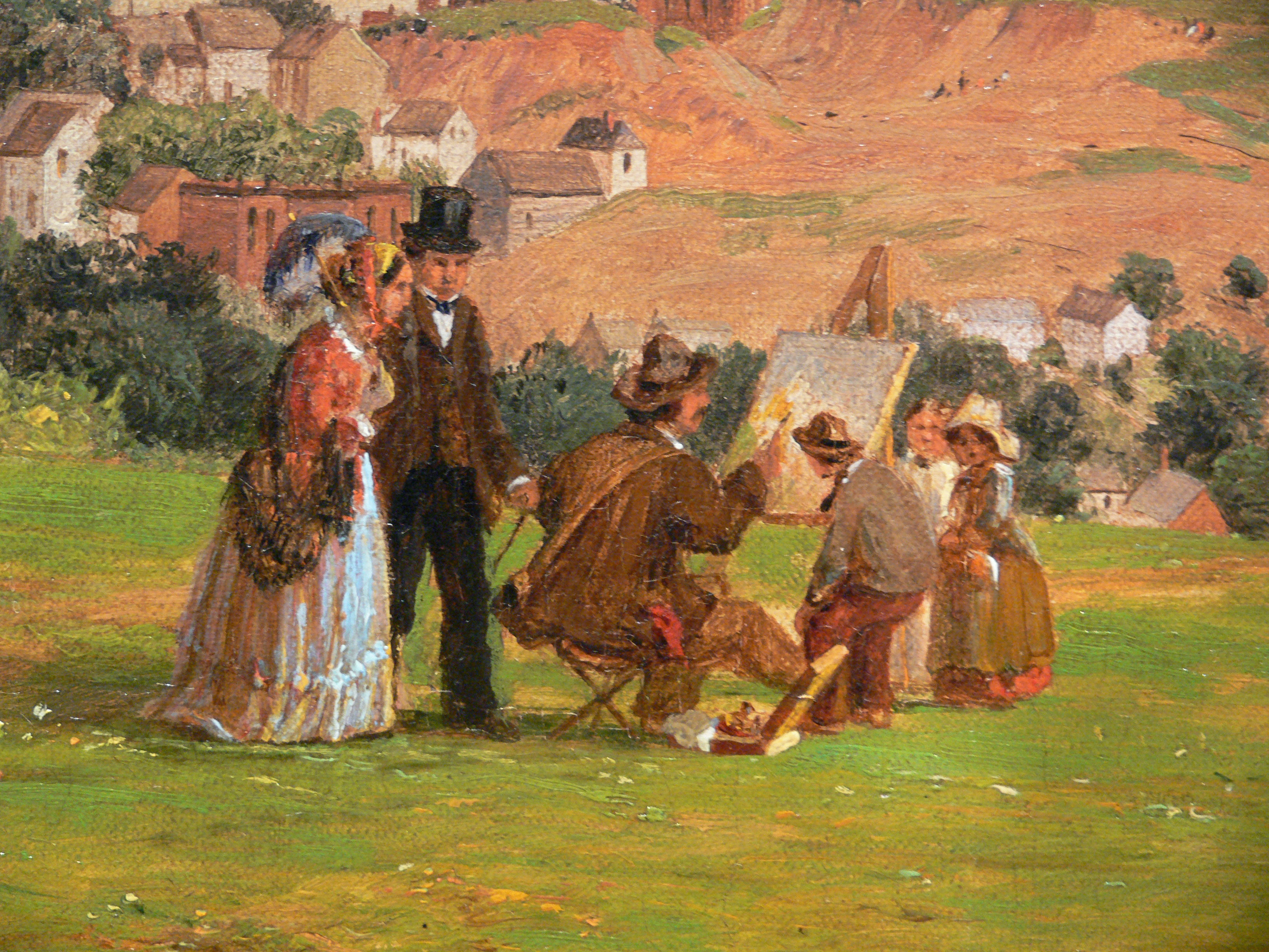 detail